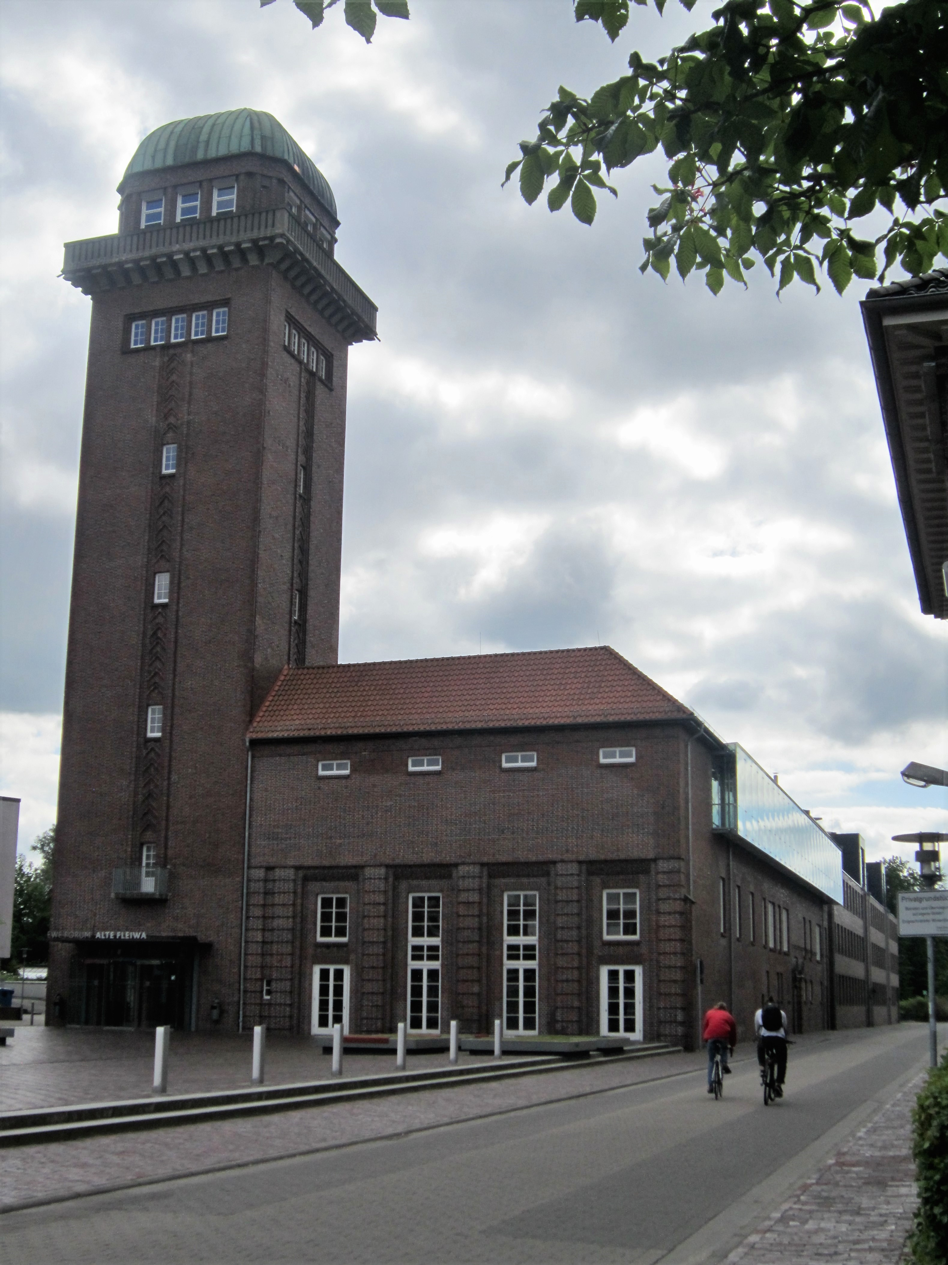 Wasserturm und Maschinenhaus der ehemaligen Bölts Fleischwarenfabrik Oldenburg (alte Fleiwa). Links der Wasserturm, rechts das Maschinenhaus. Beide Gebäude werden heute vom EWE-Forum genutzt.